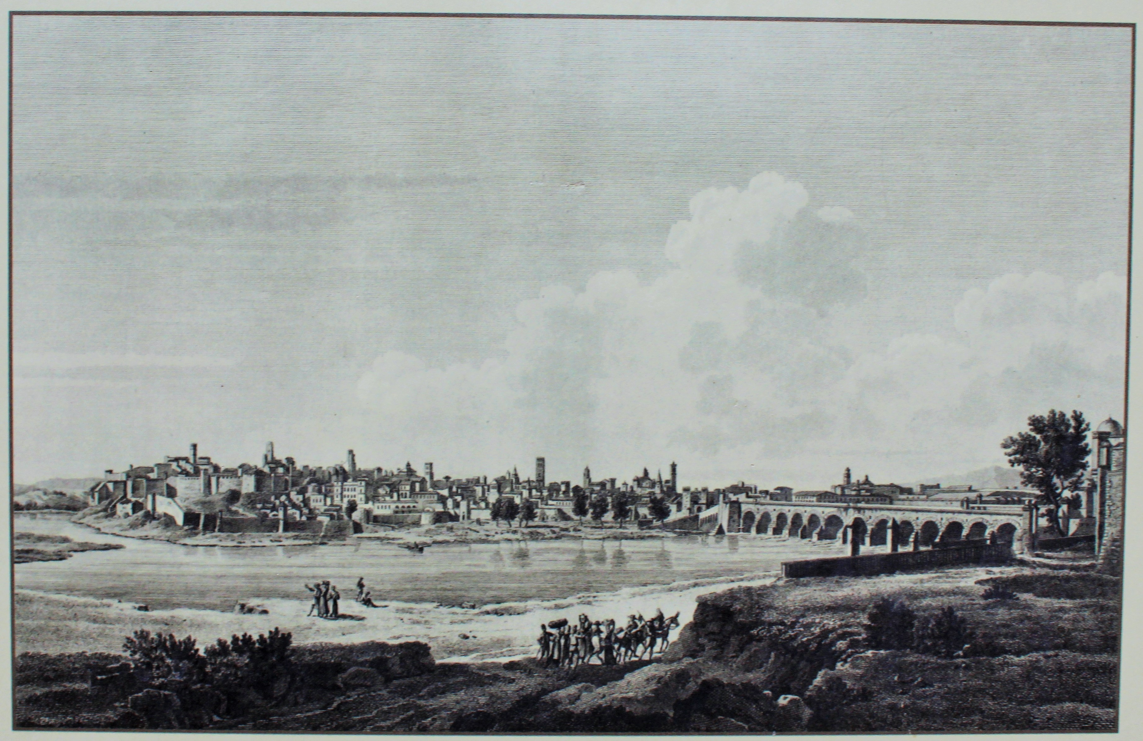 Grabado "Vista general de Badajos" de Jean Jerôme Baugean y François Jacques Dequevauviller en 1812. En el margen derecho se distingue la Puerta de San Vicente.